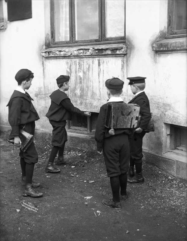 Fire gutter leker. gutter skoleransel lek klinking husvegg